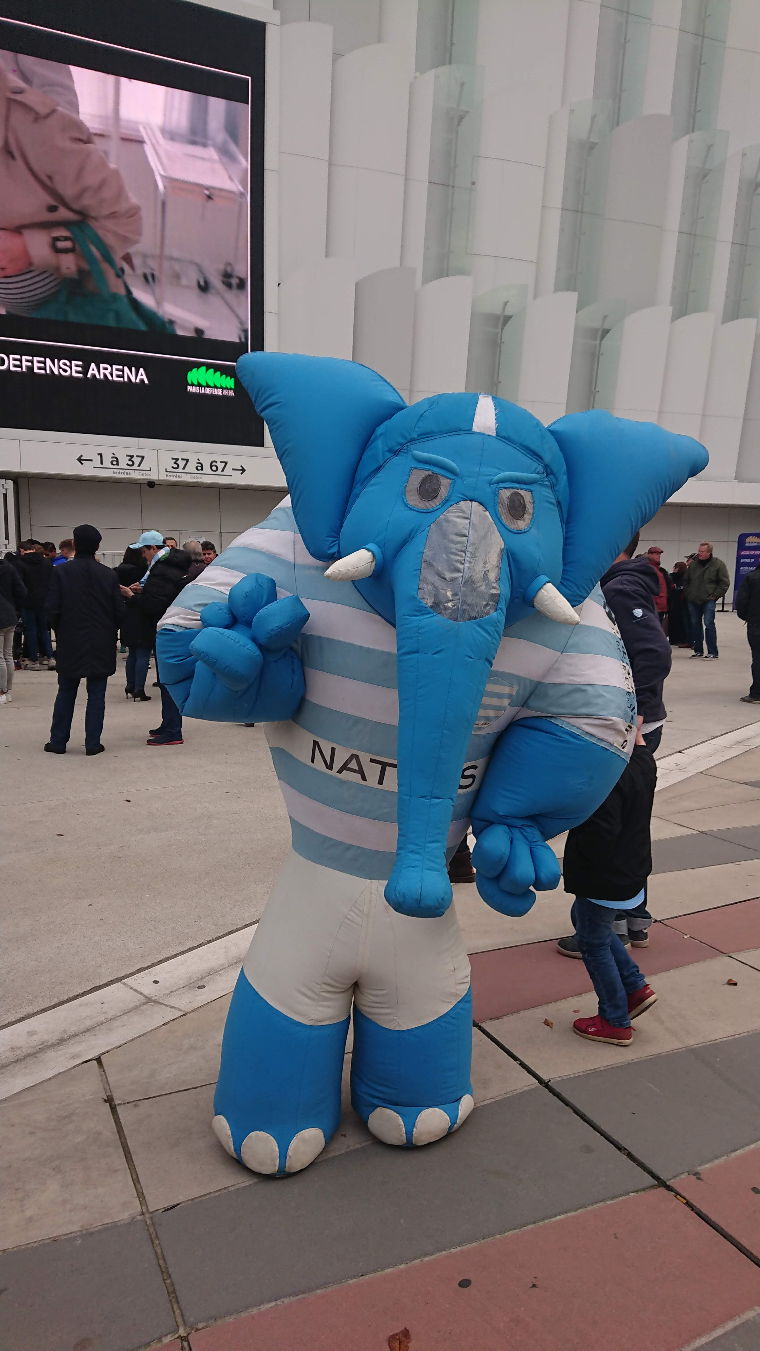 Photo de la mascotte du Racing 92 depuis 2012, prise lors de la réception du club Anglais des Saracens en Coupe d'Europe 2019-2020.